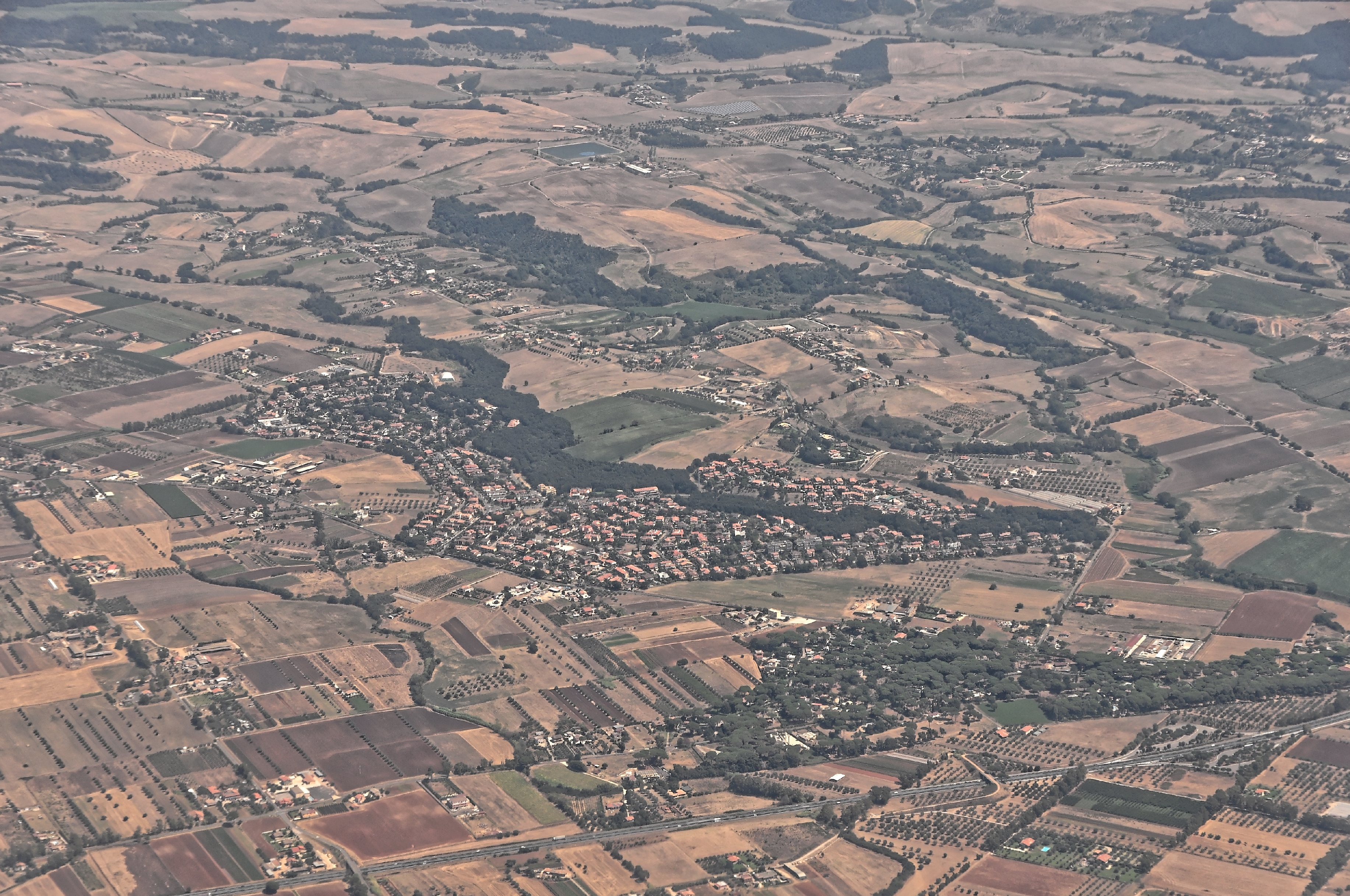 Bilder vom Flug -Rom-Düsseldorf-Hamburg 2013 Dieses Foto entstand in Zusammenarbeit mit Stadtbesichtigungen.de Die Seiten Stadtbesichtigungen.de, der dazugehörige Reise Blog sowie die Facebookseite: Stadtbesichtigungen Rom dürfen dieses Bild für Ihre Veröffentlichungen ohne den Hinweis auf Wikipedia, Commons bzw der Lizenz verwenden. Die Verantwortlichen habe von mir (Ra Boe) die Originaldaten zur freien Verfügung übermittelt bekommen.